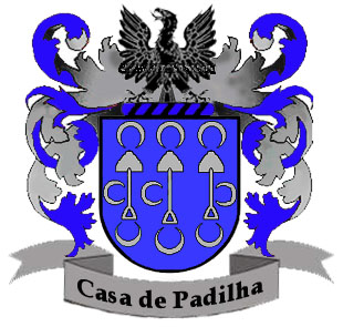 Brasão da família Padilha